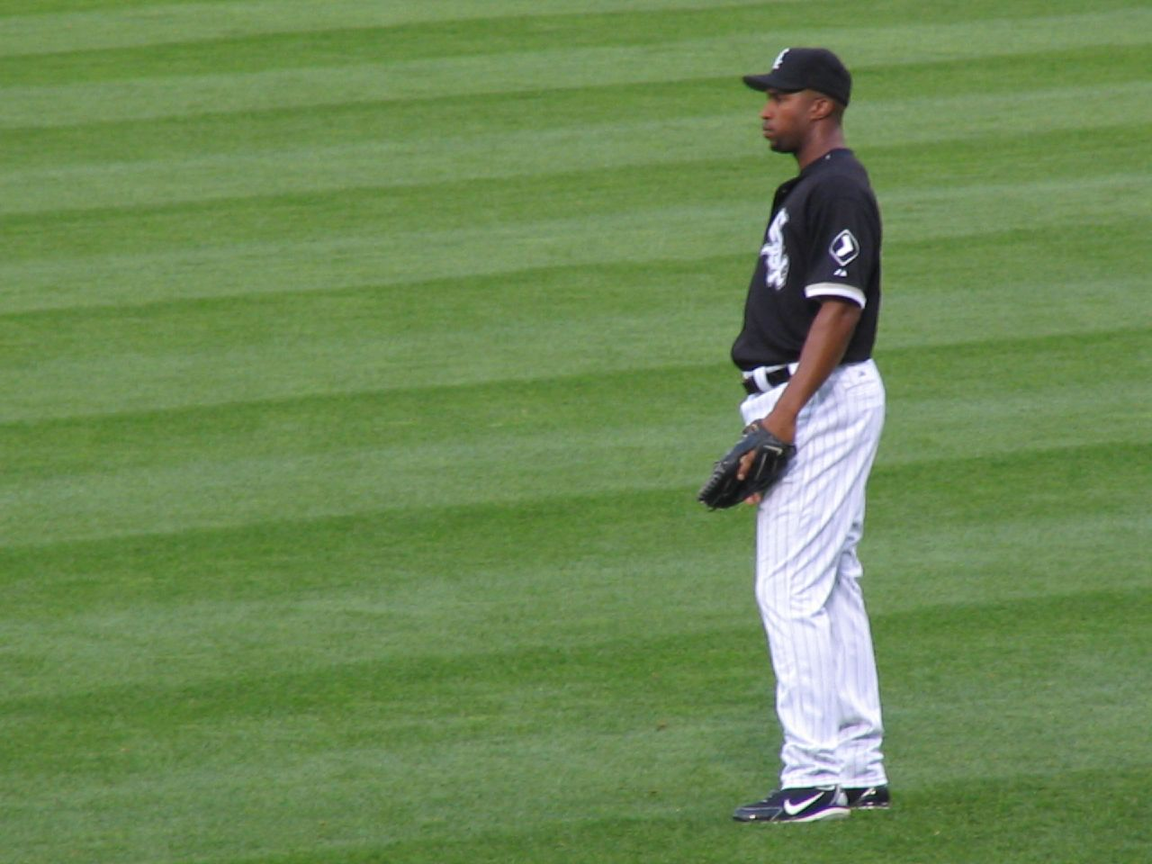 Jermaine Dye